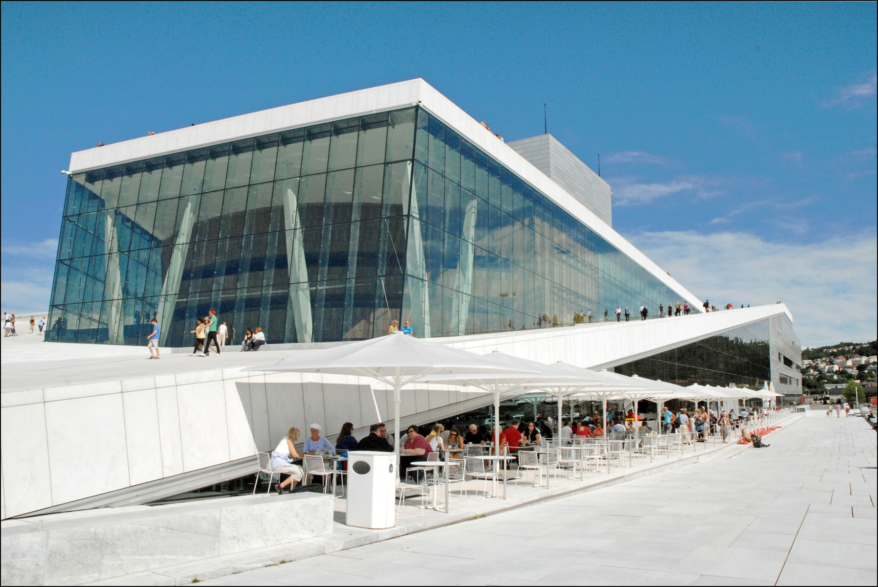 L'opéra national de Norvège à Oslo, conçu par l'agence Snøhetta (architectes Kjetil Trædal Thorsen, Tarald Lundevall et Craig Dykers) a reçu le prix européen d'architecture contemporaine 2009 snoarc.no/ L'édifice émerge du fjord au bord duquel il est construit tel un iceberg. Son toit blanc en marbre de Carrare, culminant à 32 mètres, est incliné afin d'y accueillir les promeneurs. A l'intérieur, trois salles de 1350, 400 et 200 places. Une grande partie des 38500 mètres carrés du bâtiment étant située sous le niveau de la mer, sa construction a nécessité la pose de 12000 m2 de palplanches. Il repose sur 28 kilomètres de piliers dont certains à moins 60 mètres. Les travaux ont duré cinq ans et coûté 525 millions d'euros. extrait du site